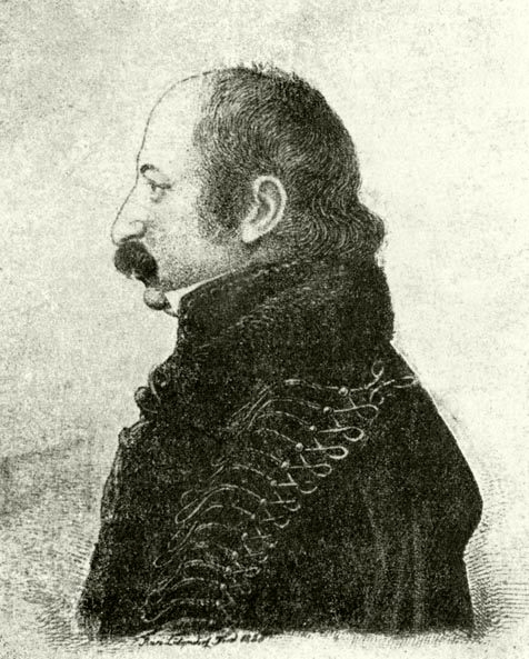 Bezerédj György magyar jogász, főispán, országgyűlési követ.